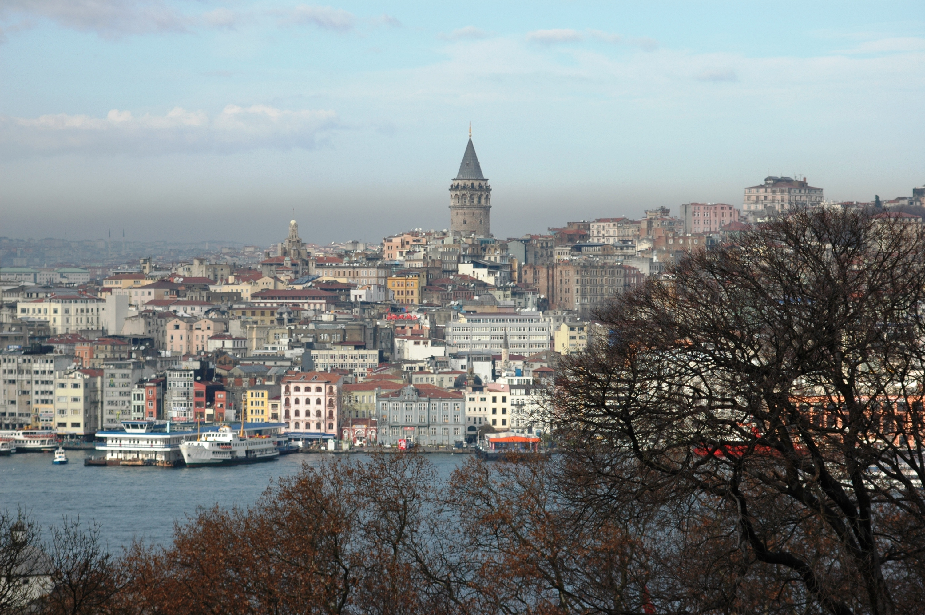 Istanbul - Gàlata